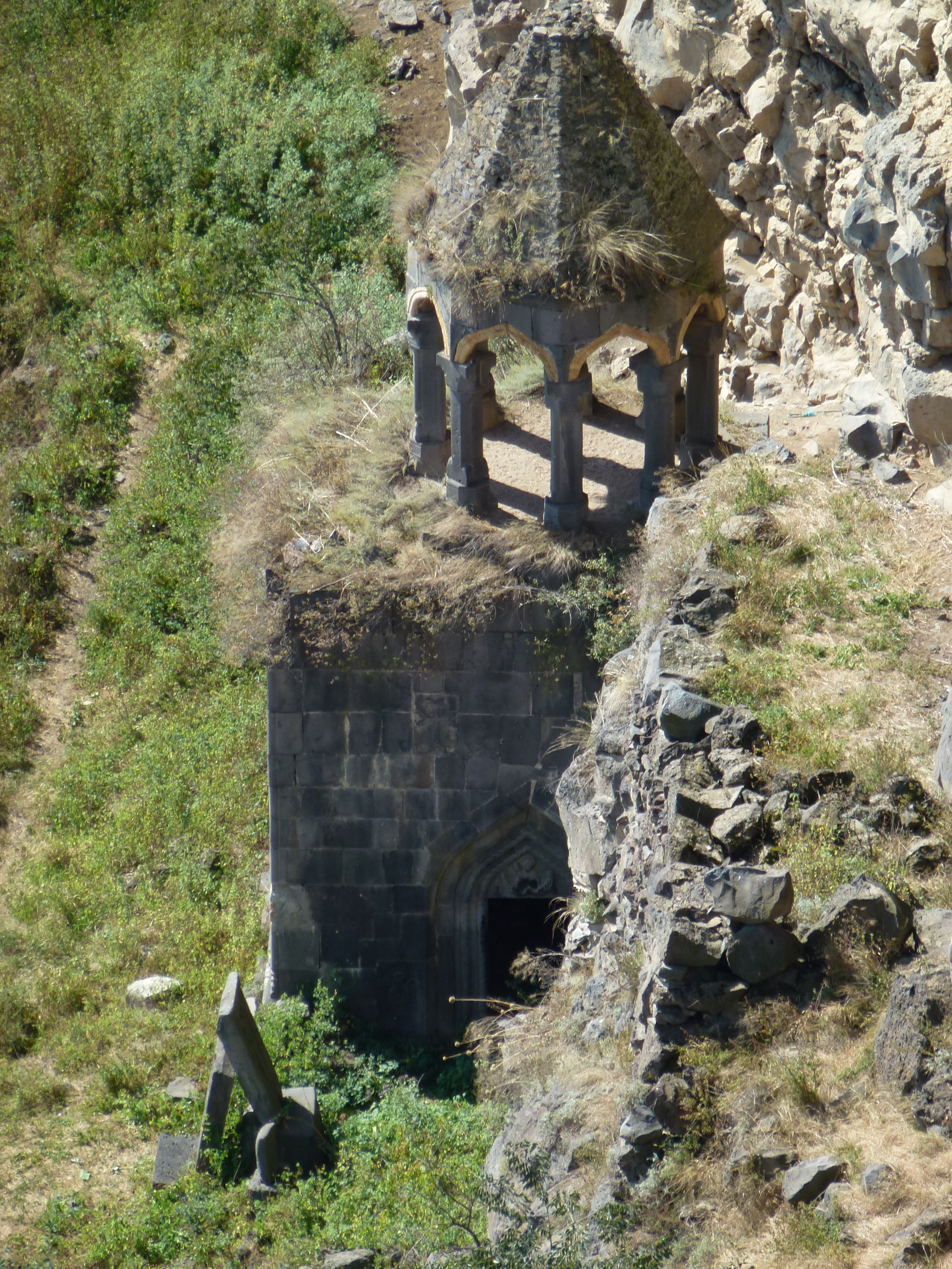 Հոռոմայրի Սուրբ Նշան եկեղեցի, Վերին 112/10